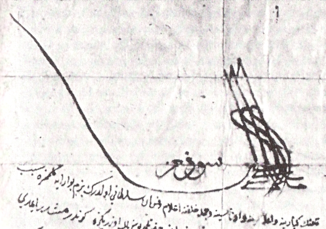 Tughra des Khans der Krimtataren Murad Giray. Sie befindet sich auf einem Befehlsschreiben von 1683 (rechts) an die „Vornehmen, die Hohen und Niederen und die ganze Bevölkerung“ Wiens, in dem der Khan Geld, Pferde und einen Zobelpelz fordert. Seine Tughra und das Schreiben erinnern sehr an die pençe und das Kapitulationsschreiben des Großwesirs Kara Mustafa Pascha von 1683.